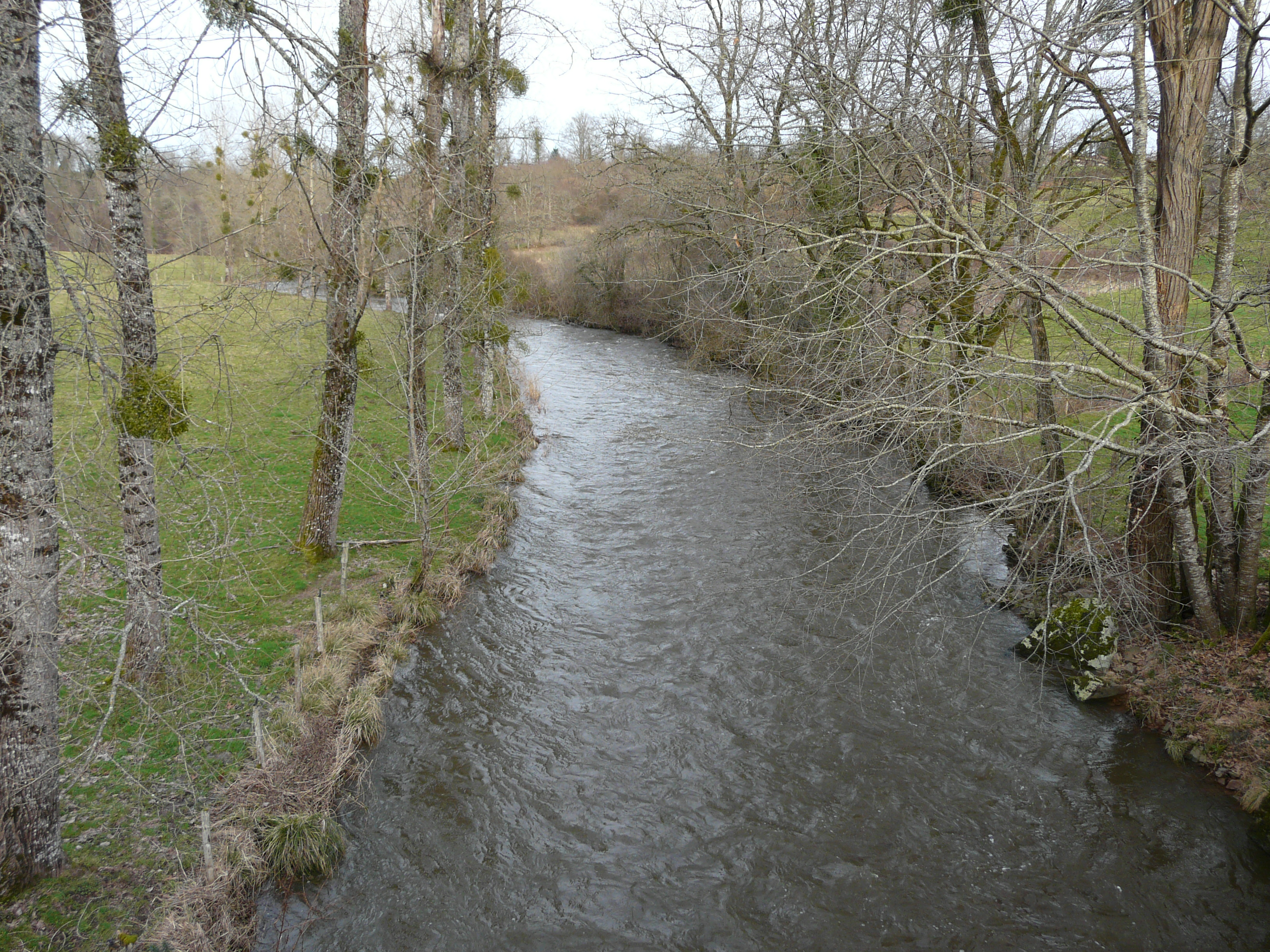 La Tardoire en amont du pont des routes départementales 50 et 88, entre Roussines (Charente) à gauche et Maisonnais-sur-Tardoire (Haute-Vienne) à droite.